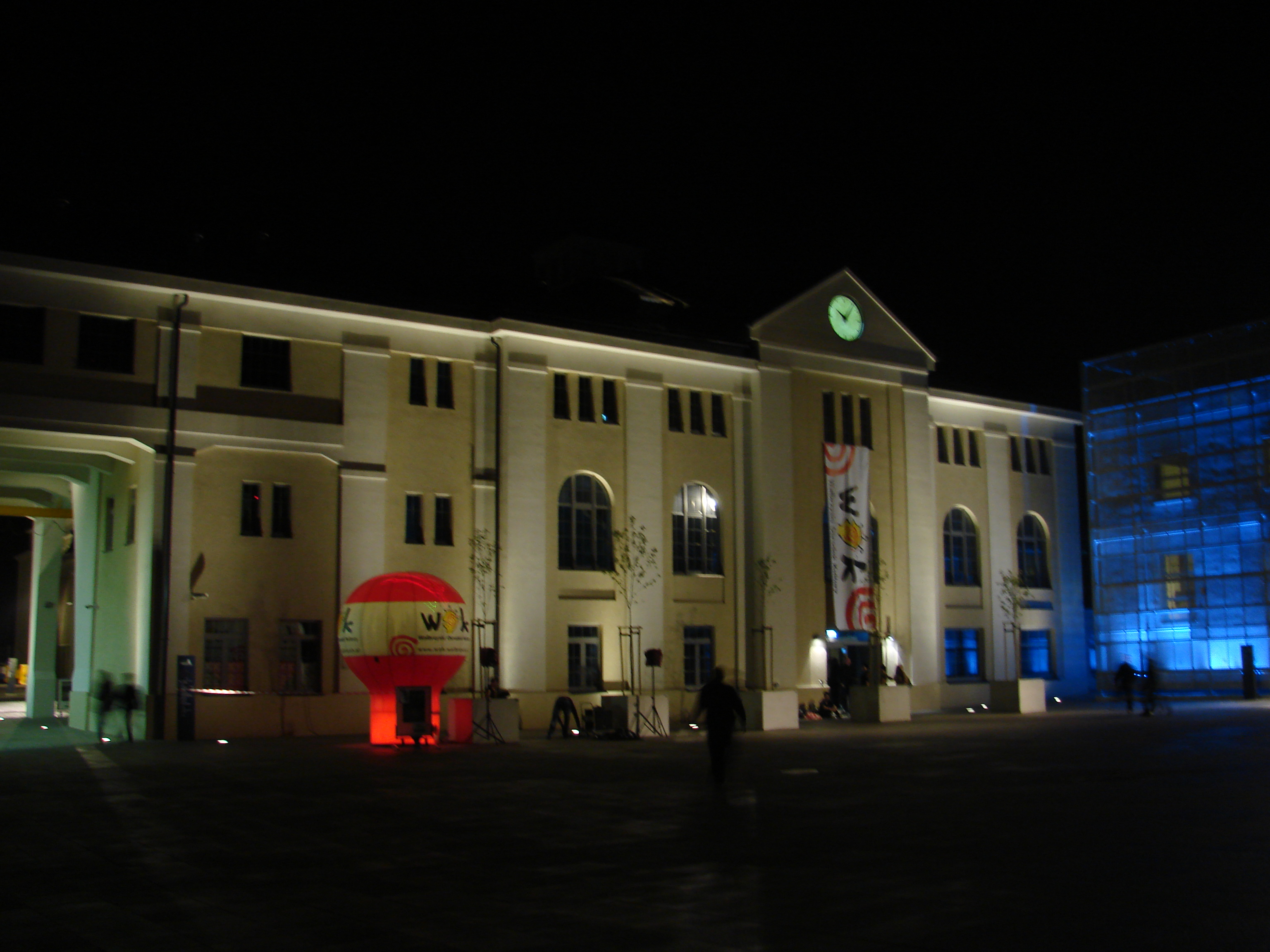 Wałbrzyski Ośrodek Kultury